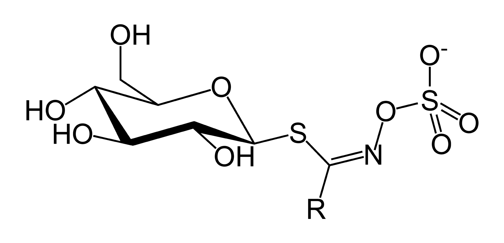 Glucosinolate-skeletal